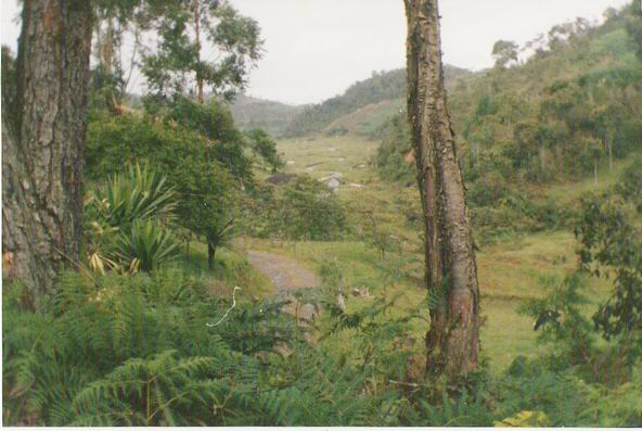 Fotografía personal, Albeiro Rodas, del municipio de Amalfi, para el artículo pertinente. Donación a la wikipedia.